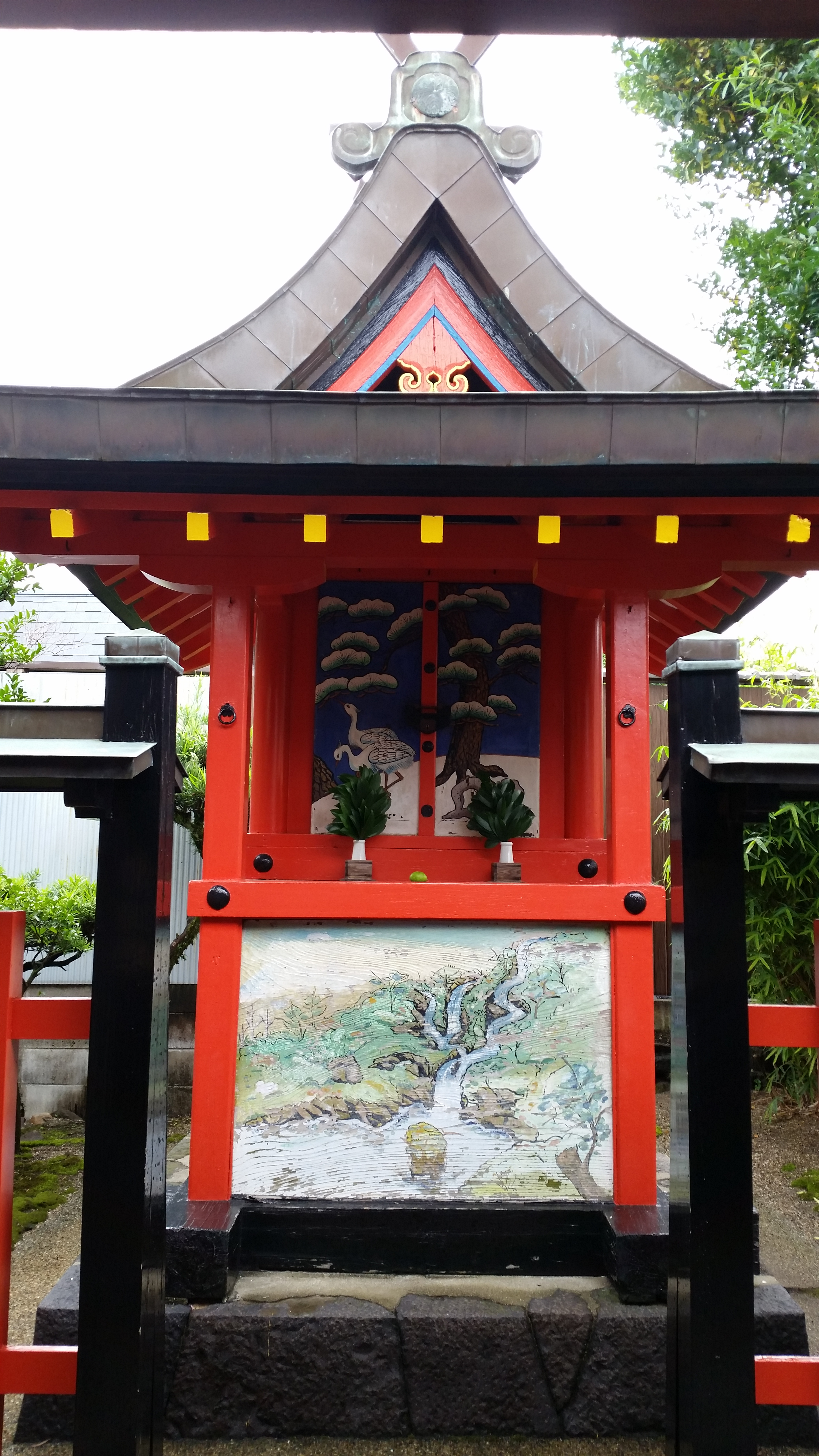 住吉神社本殿、奈良